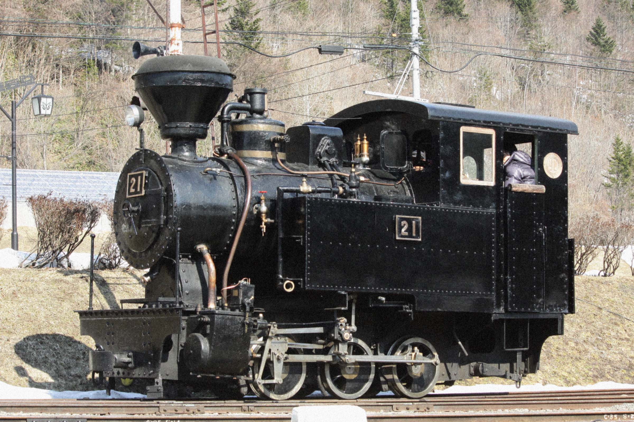 武利森林鉄道18号形蒸気機関車（21号）。北海道遠軽町「丸瀬布森林公園いこいの森」にて2014年撮影。